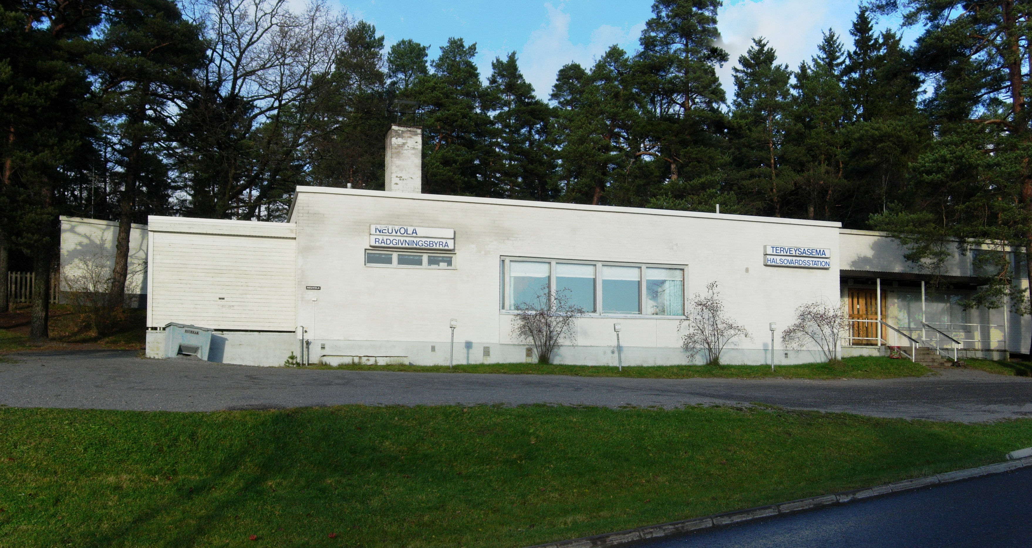 Jäkärlän terveyskeskus ja neuvola.